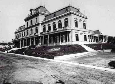 Fachada del Pabellón de Clinoterapia del Hospital Neuropsiquiátrico José Borda, hacia 1910. Buenos Aires.